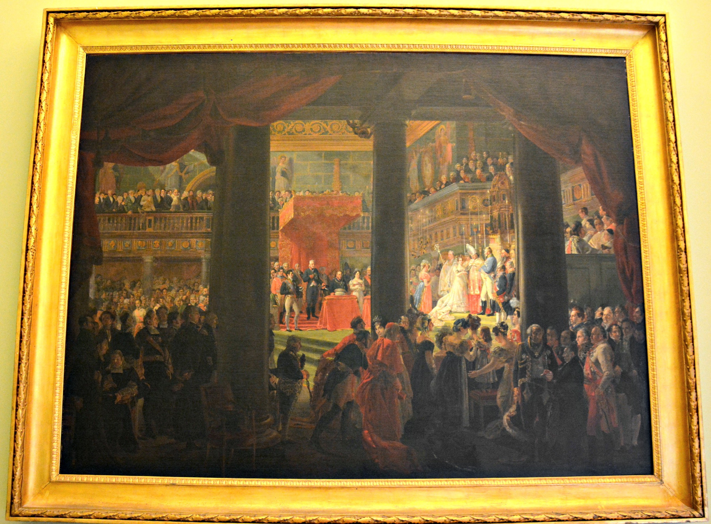 Vedi titolo